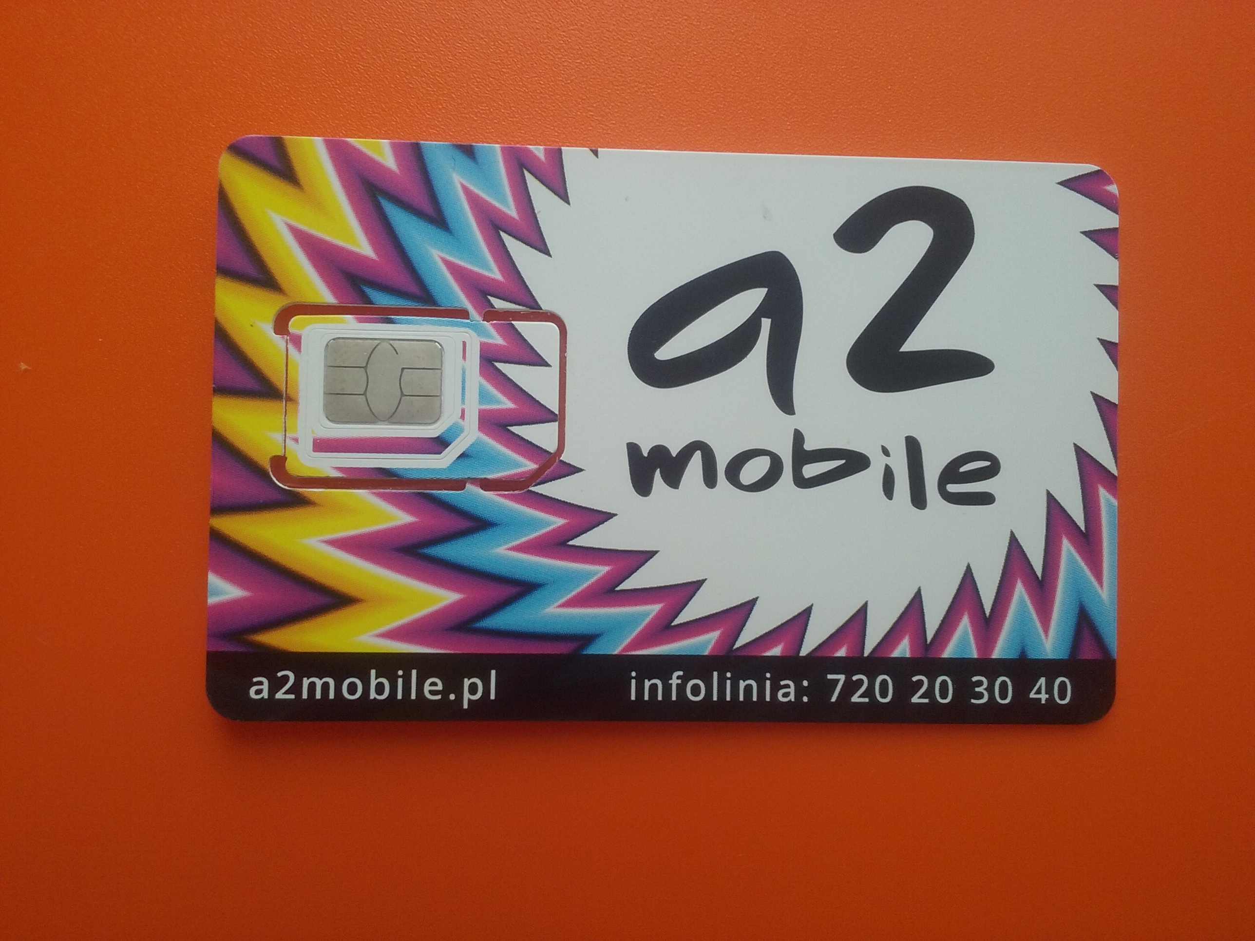 Karta SIM polskiej sieci a2mobile w holderze